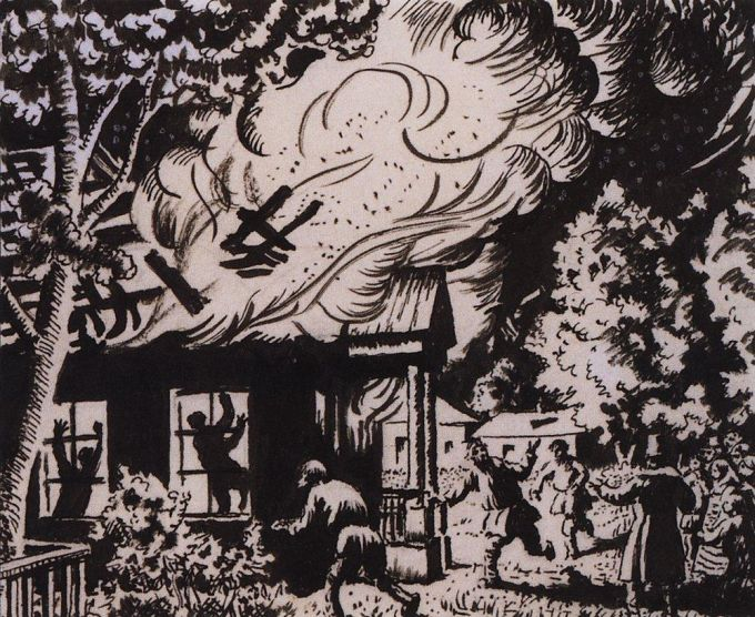 «Дубровский». Пожар в Кистеневке.jpg